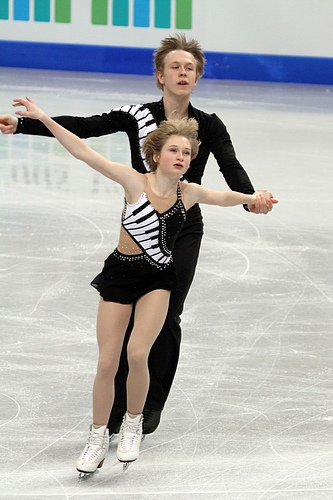 Hayleigh Bell и Элистейр Силвесте (Канада) на чемпионате мира по фигурному катанию среди юниоров 2012